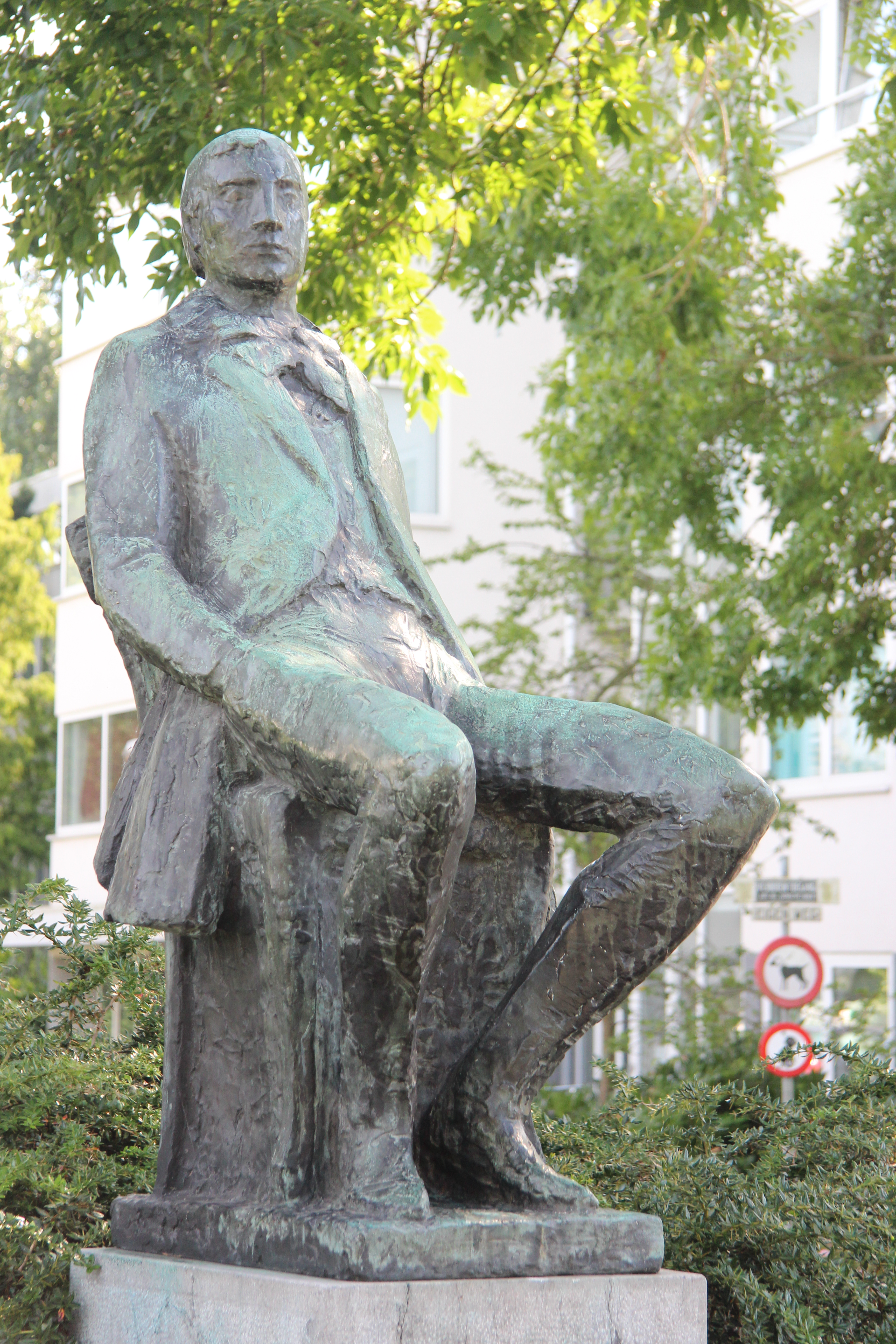 Auke Hettema - Piet Paaltjens - 1960, Klikspaanweg in Leiden